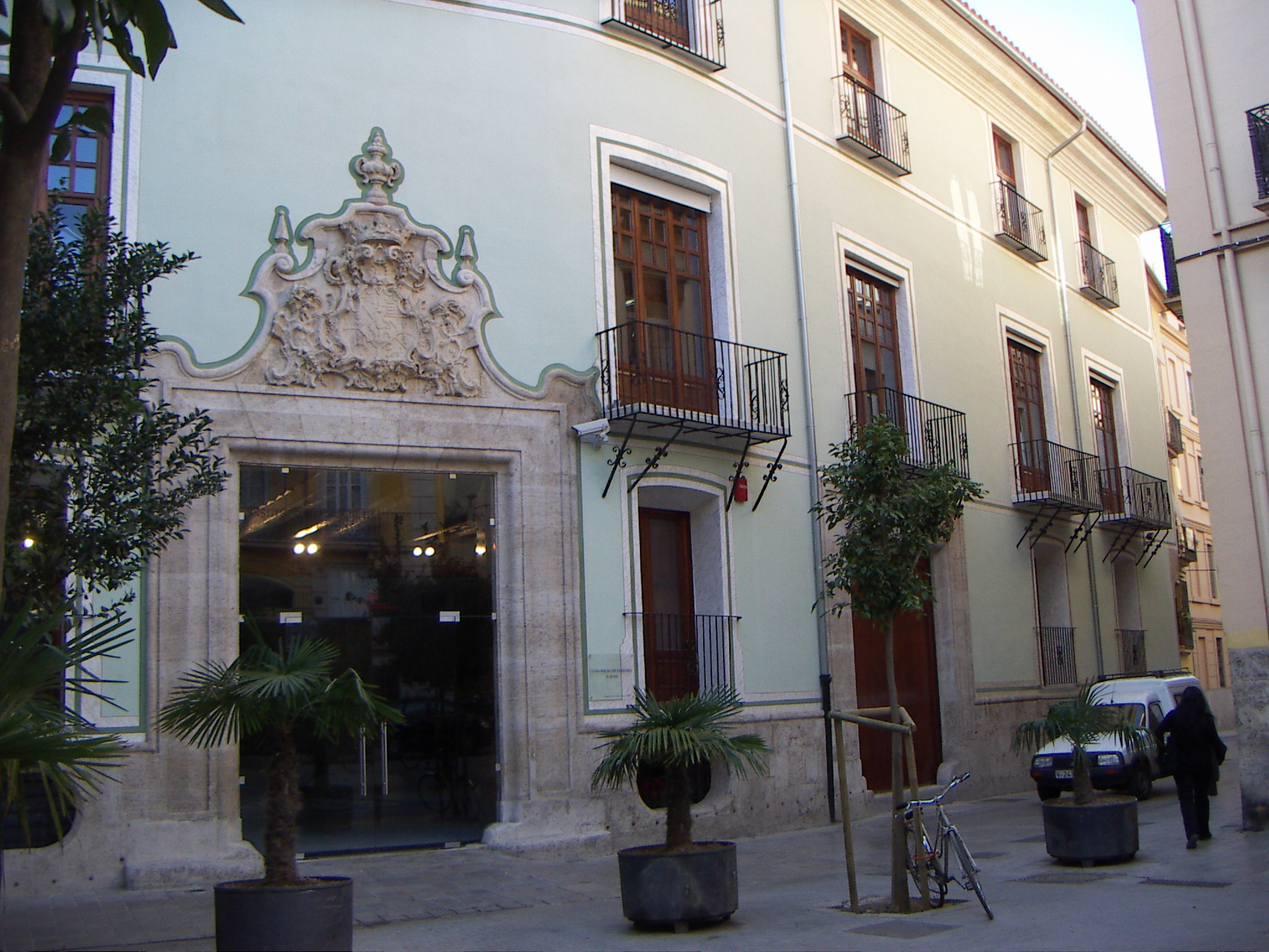 Façana del Palau de Cerveró; Plaça Cisneros, 4 (València). Fou la seu de l'antic i oficial Institut d'Estudis Valencians, creat pel Conseller Francesc Bosch i Morata, el 9 de febrer de 1937. Actualment és la seu del Museu d'Història de la Medicina.